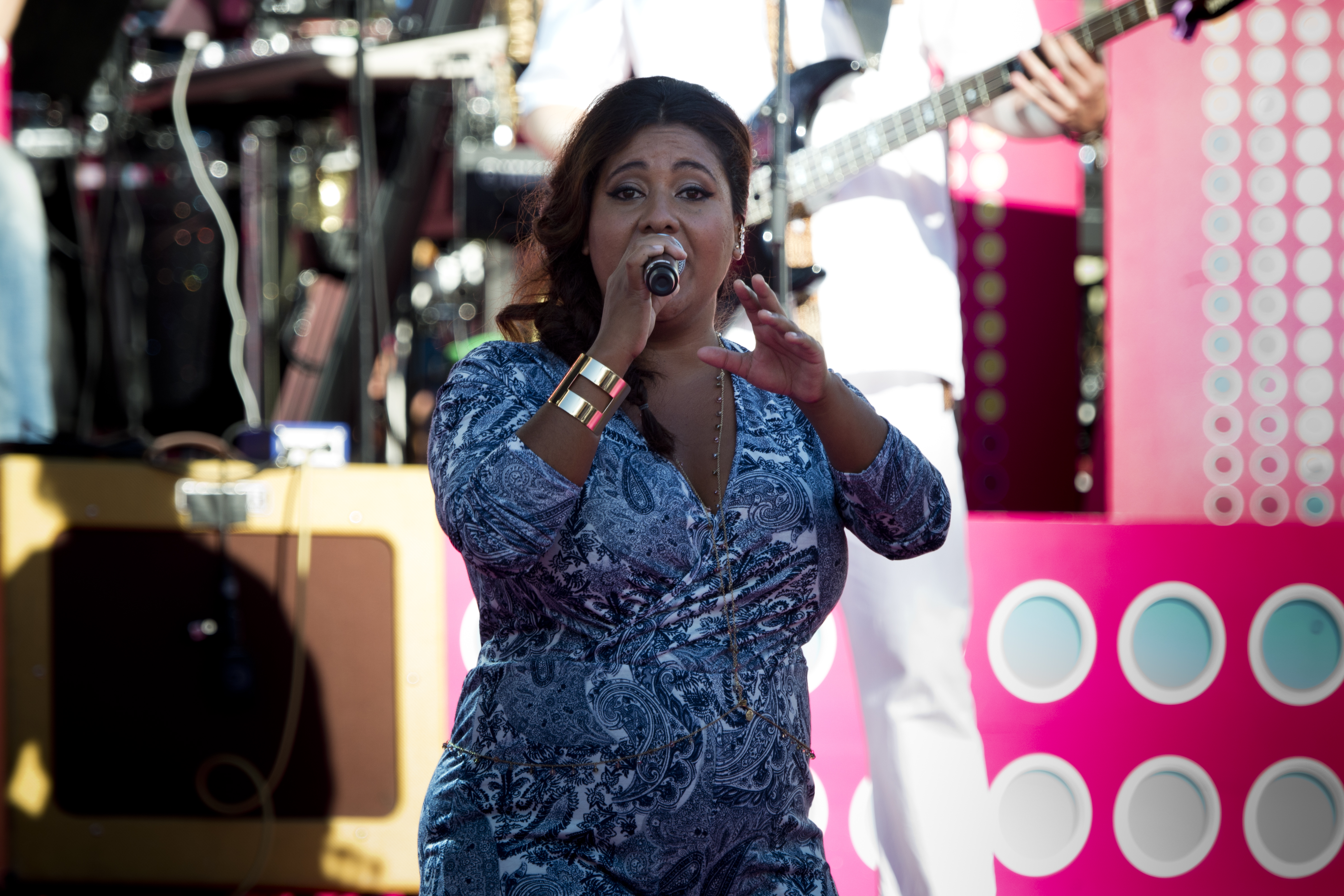 Kristin Amparo besöker Sommarkrysset